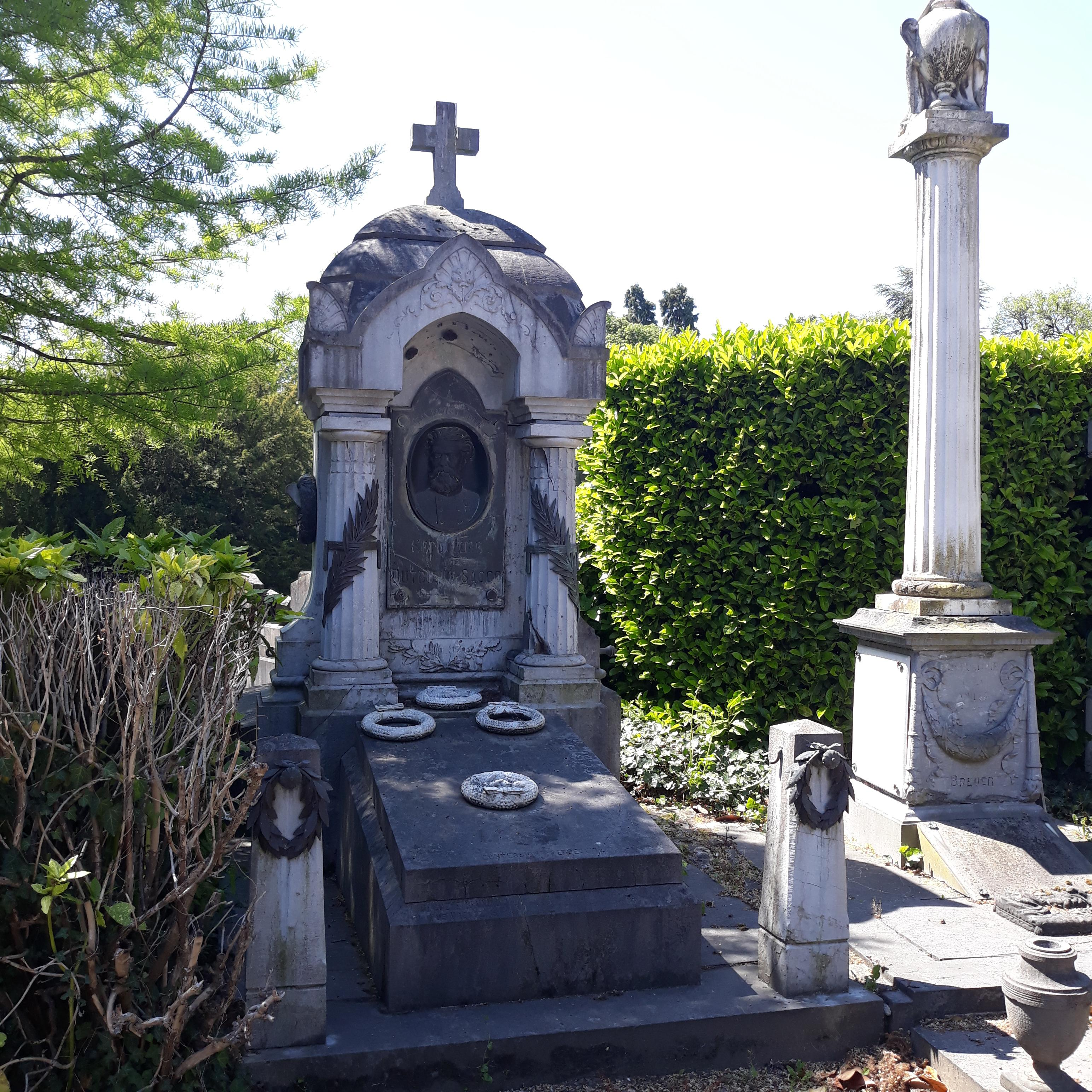 Sépulture d'un couple ornée de multiples ornementations dont la symbolique est fortement lié à l'univers de la mort.